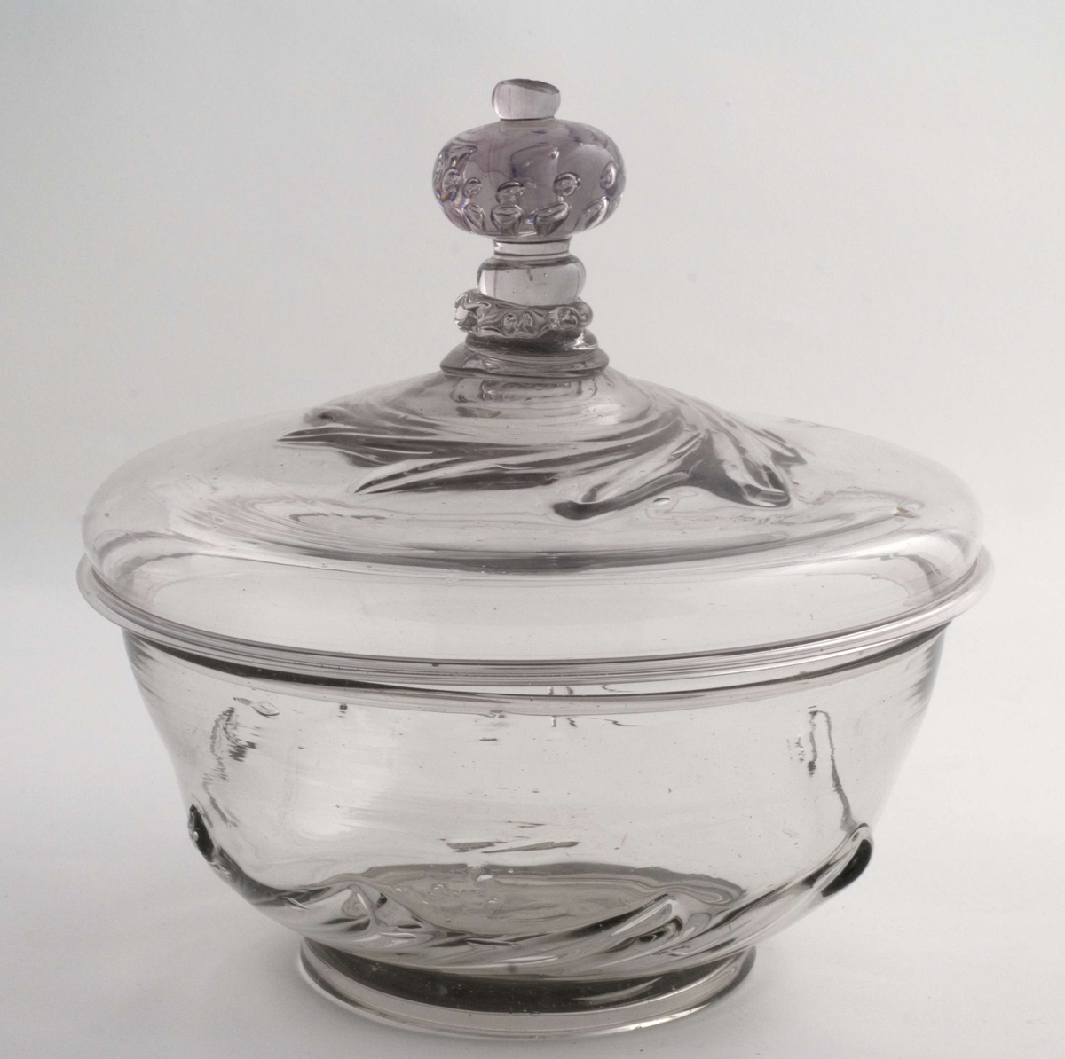 Punsjebolle, antakelig fra Nøstetangen glassverk 1753-1777. Diam.22 cm.